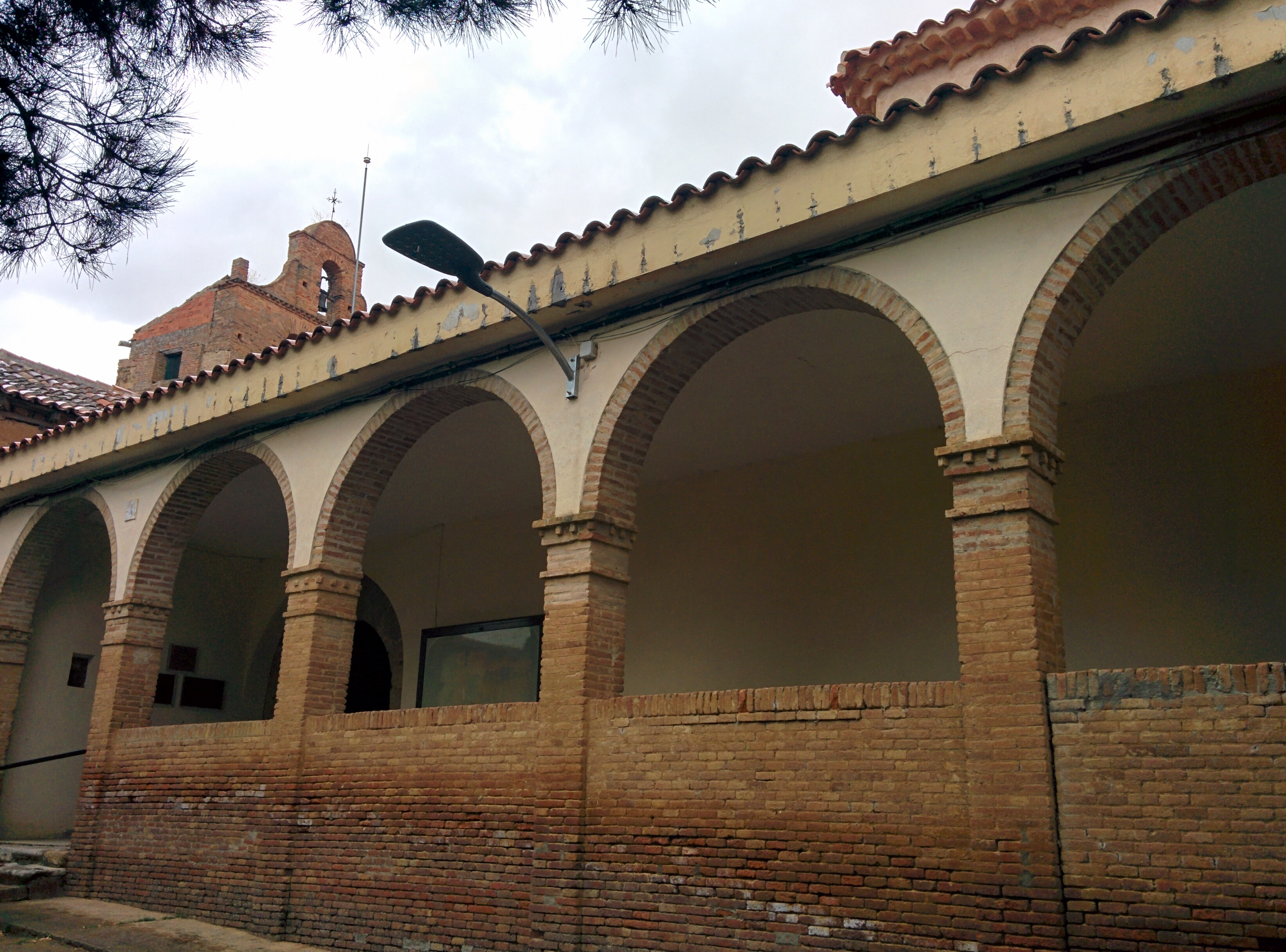 Iglesia del Salvador, en Urones de Castroponce (Valladolid, España).